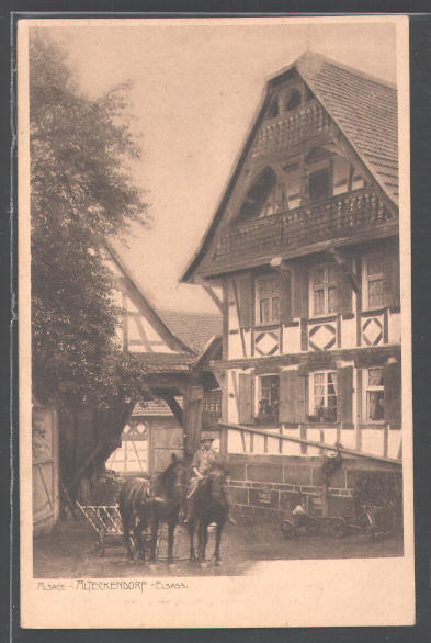 ancienne carte postale d'Alteckendorf datée de 1917